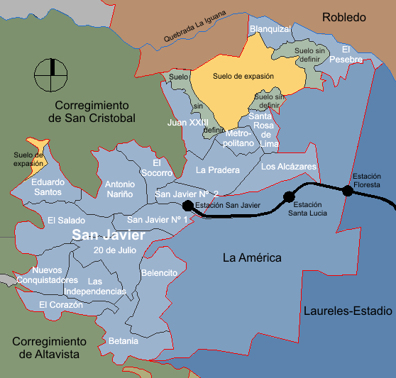 mapa de la división barrial de la comuna San Javier. Medellín, Colombia.